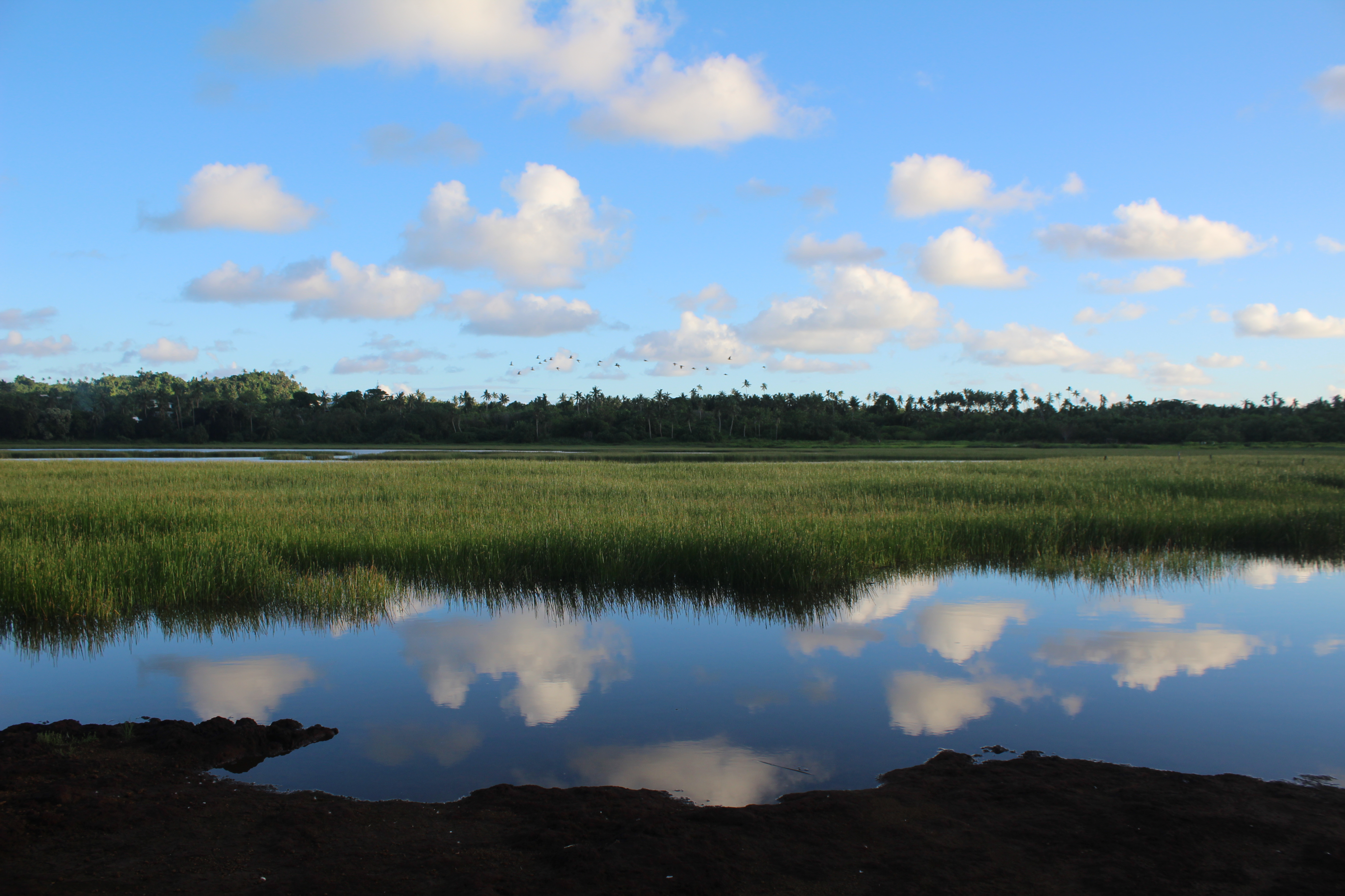 Caché par une forêt, le lac Kikila est un véritable havre de paix verdoyant. Il n'est pourtant pas si loin de la RT1 (route principale de Wallis), près du village du Ha'afuasia. Avis aux rêveurs en quête de sérénité.